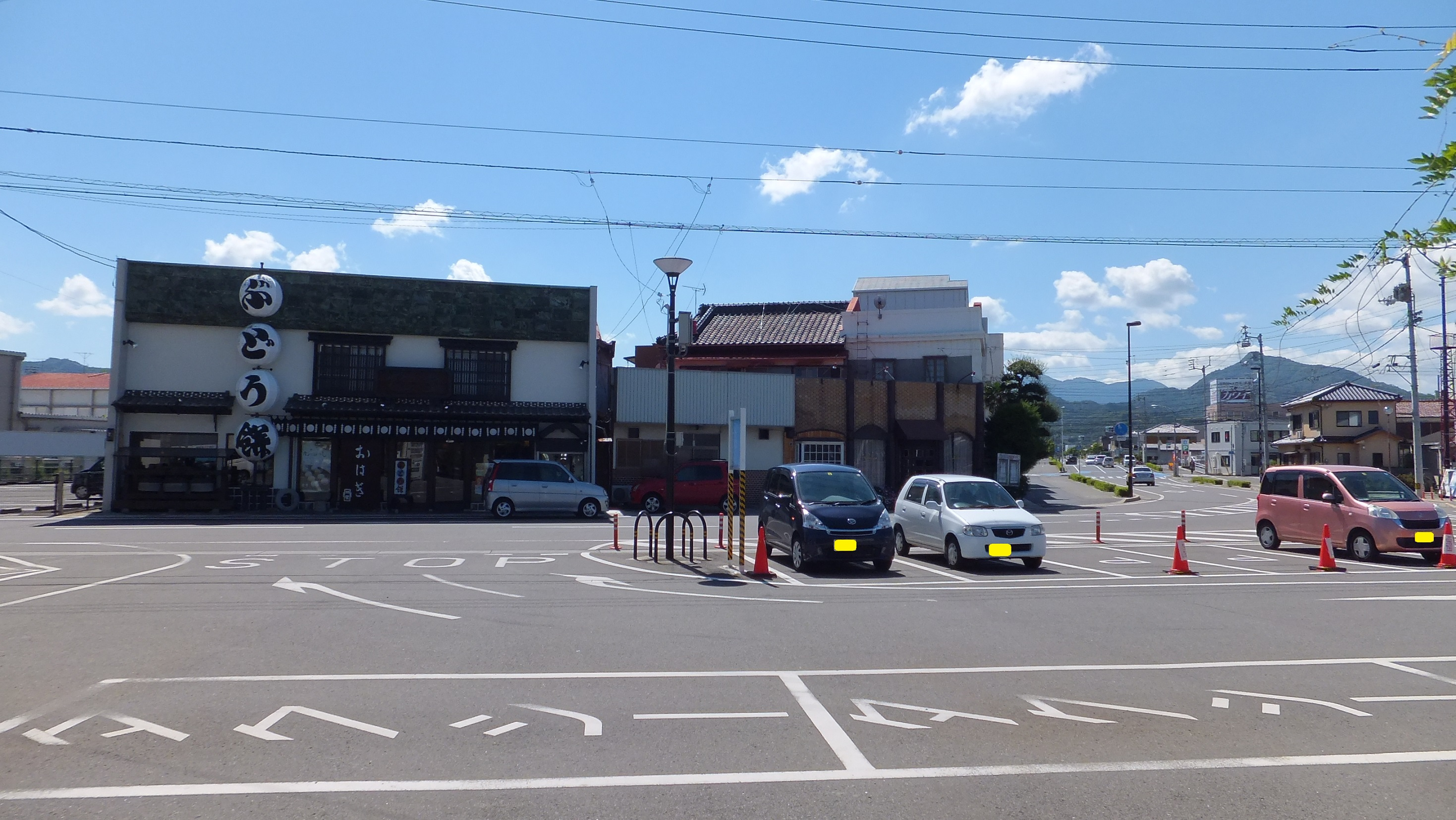 JR高徳線 三本松駅 駅前 （香川県東かがわ市 2015年）